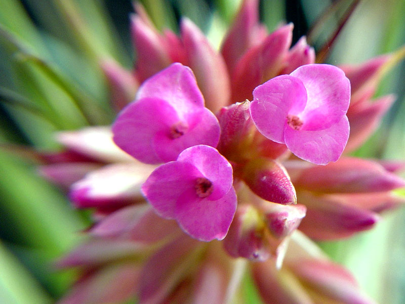 Tillandsia geminiflora, fam. BromeliaceaeTillandsia geminiflora